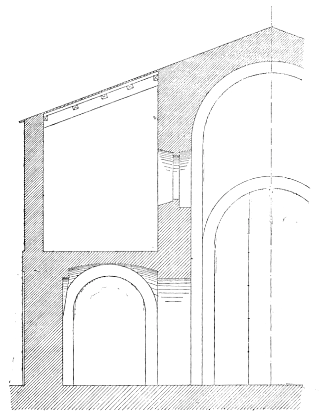 Coupe de l'église Sainte-Eulalie de Fuilla par Jean-Auguste Brutails